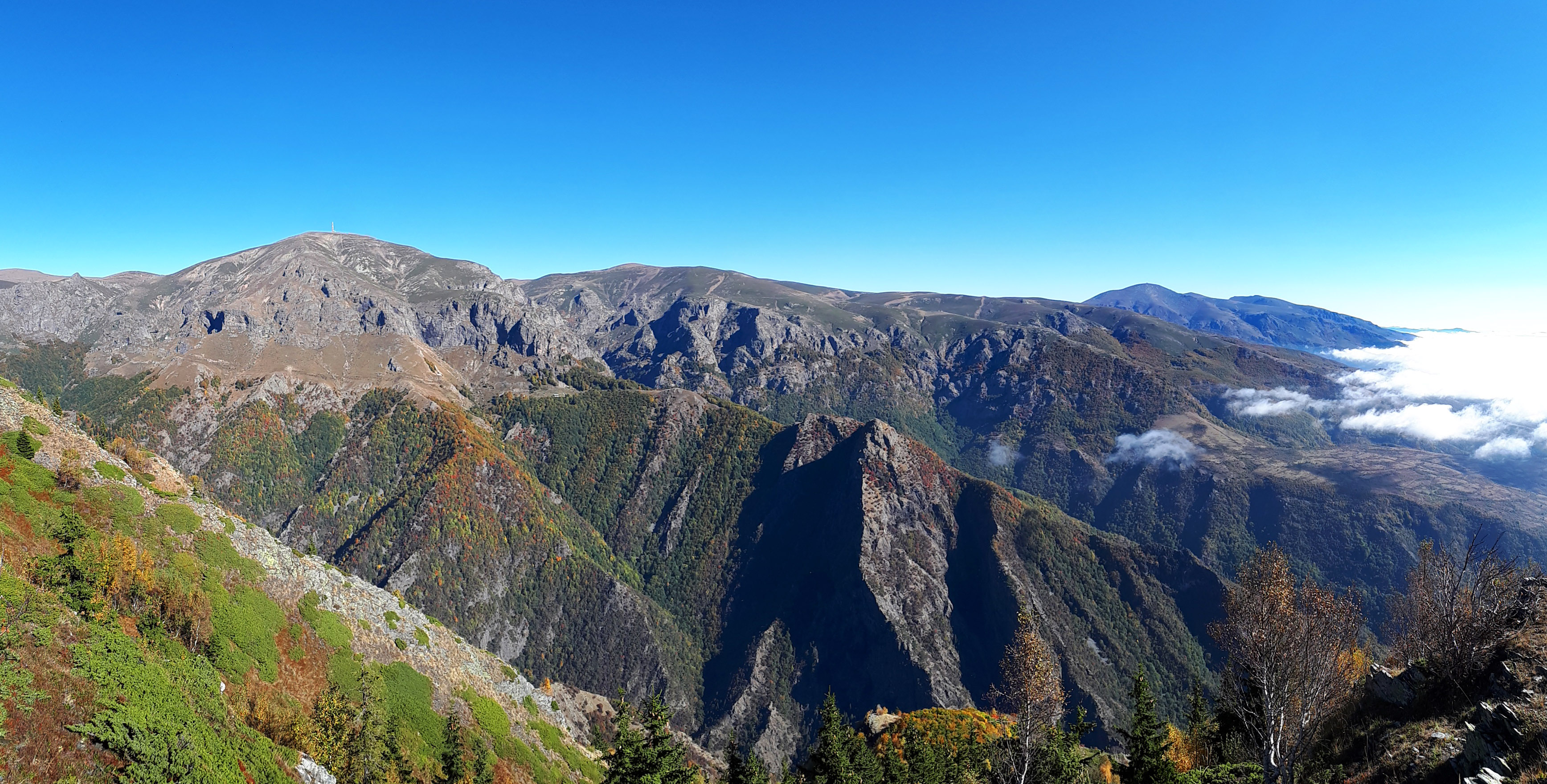 Поглед от масива Равнец към Южен Джендем, Райските скали и връх Ботев.